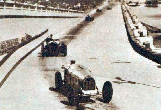 Grand Prix de Monaco 1933, Varzi devant Nuvolari le long du port.